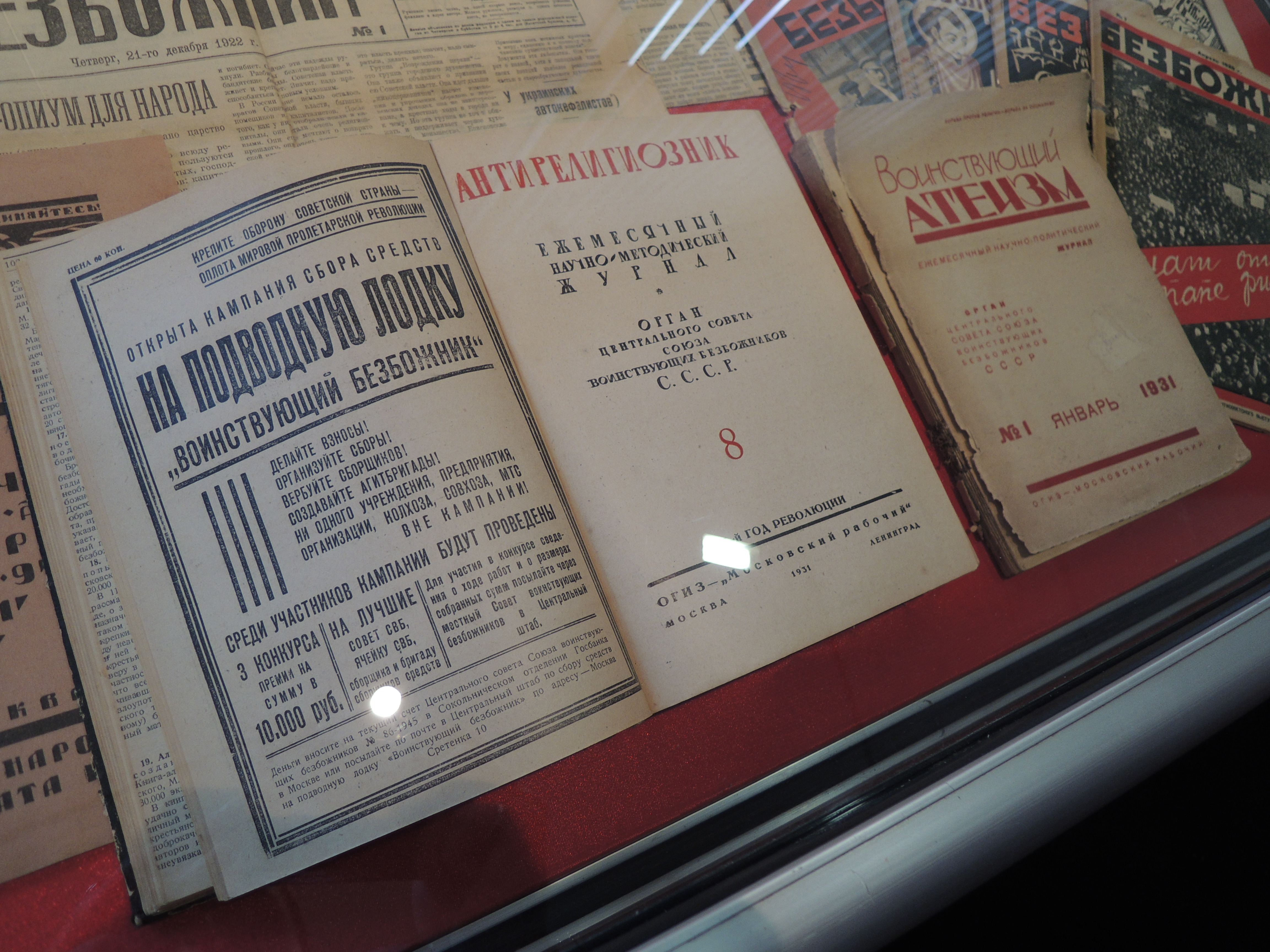 Выставка «Преодоление: Русская Церковь и Советская власть» в Государственном центральном музее современной истории России в Москве, 2012